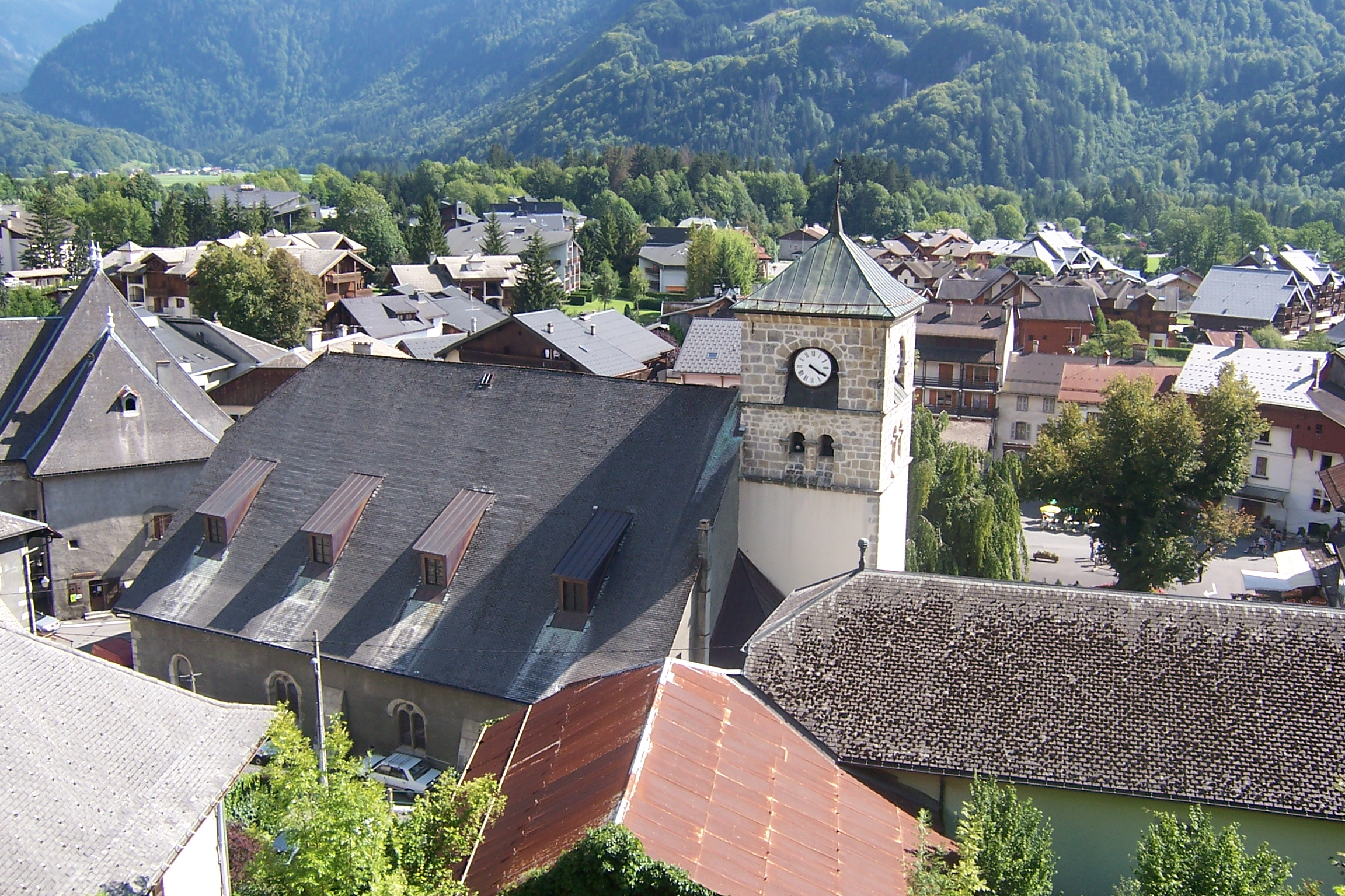 Samoens depuis le jardin Jaysinia